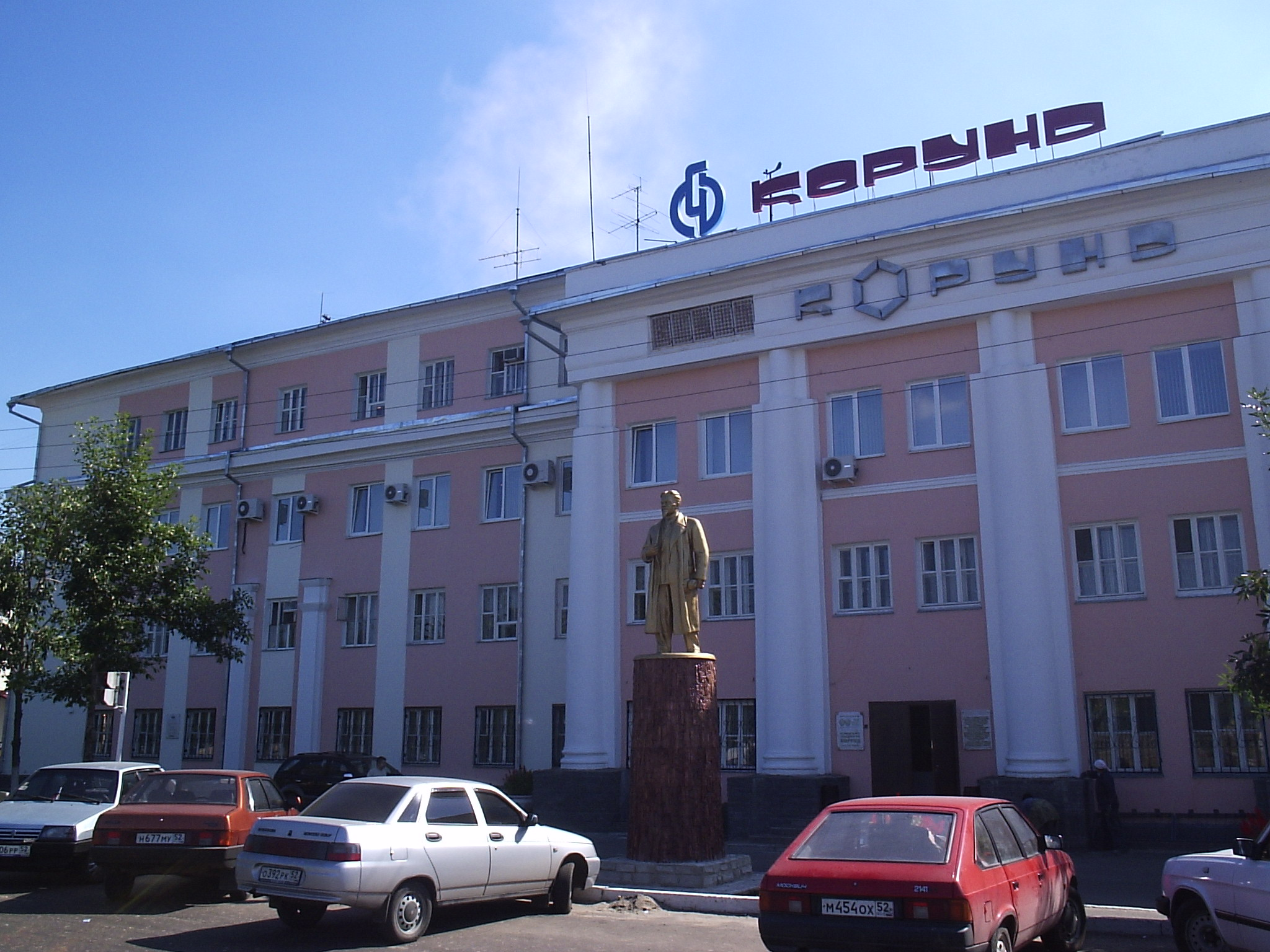 ООО "Корунд" (г.Дзержинск Нижегородской области)